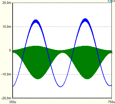 Oszillogram (Spice Simulation) von Audion mit 99 Triode. Grün ist Spannung am Gitter, Blau ist Spannung an Anode bei 7MHz AM-Träger mit 85% Modulation